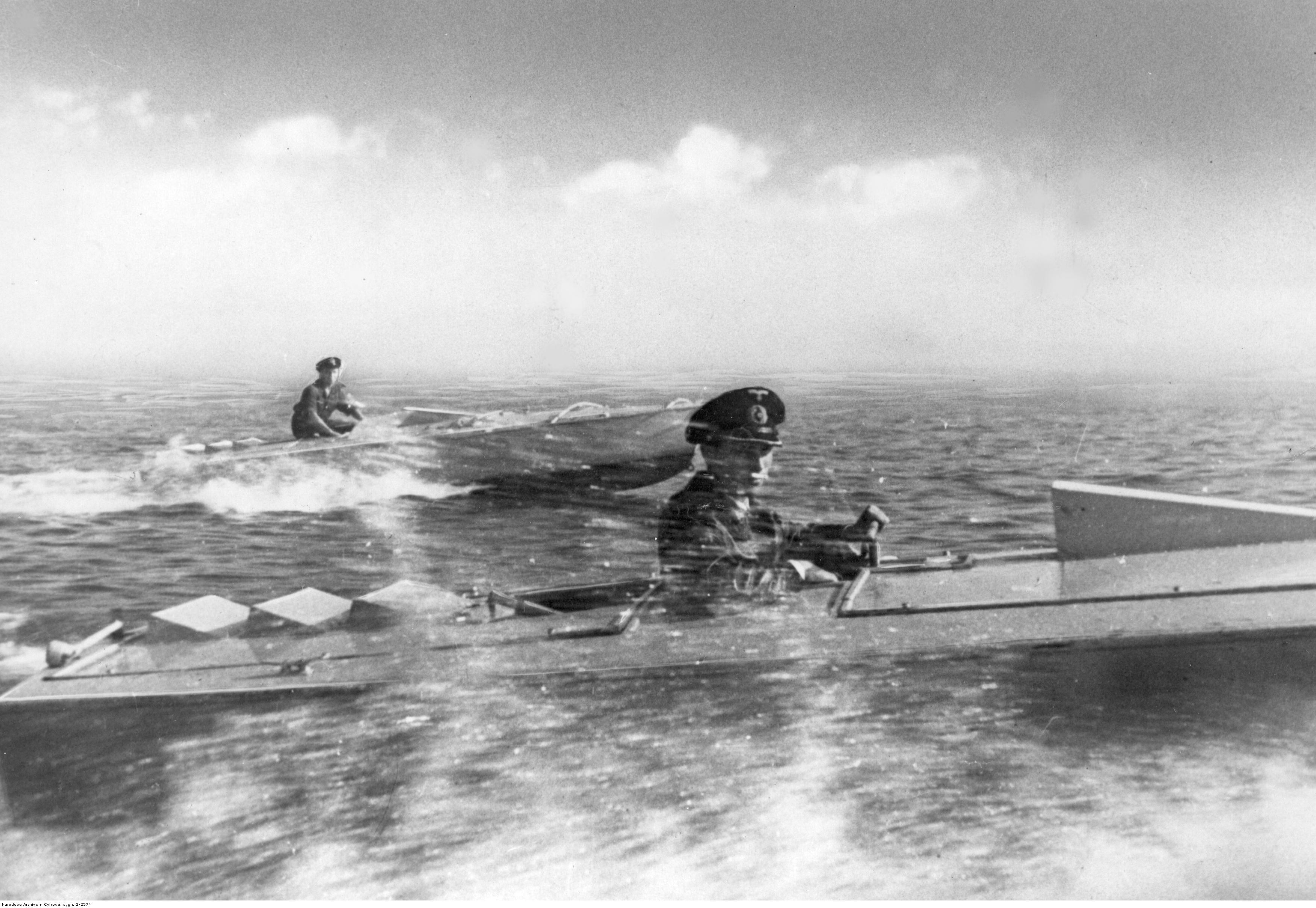 Dwie niemieckie łodzie torpedowe DWM 35400 Sprengboot "Linse" na morzu.